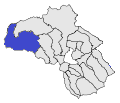 Porta a l'Alta Cerdanya, obtingut a partir d'un mapa de lliure disposició